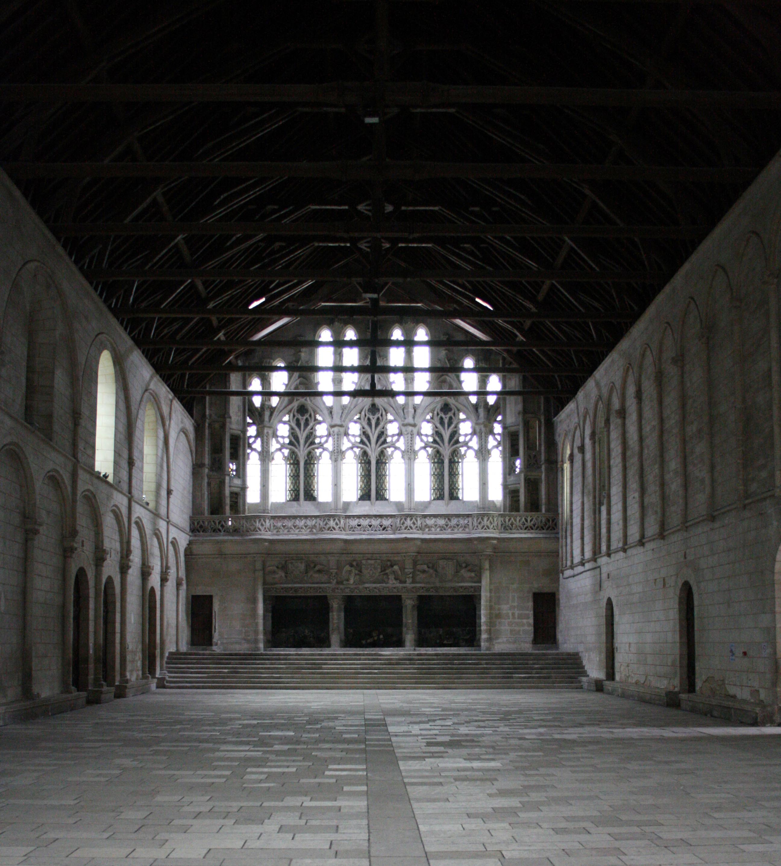 Palais de justice de Poitiers, salle des pas perdus